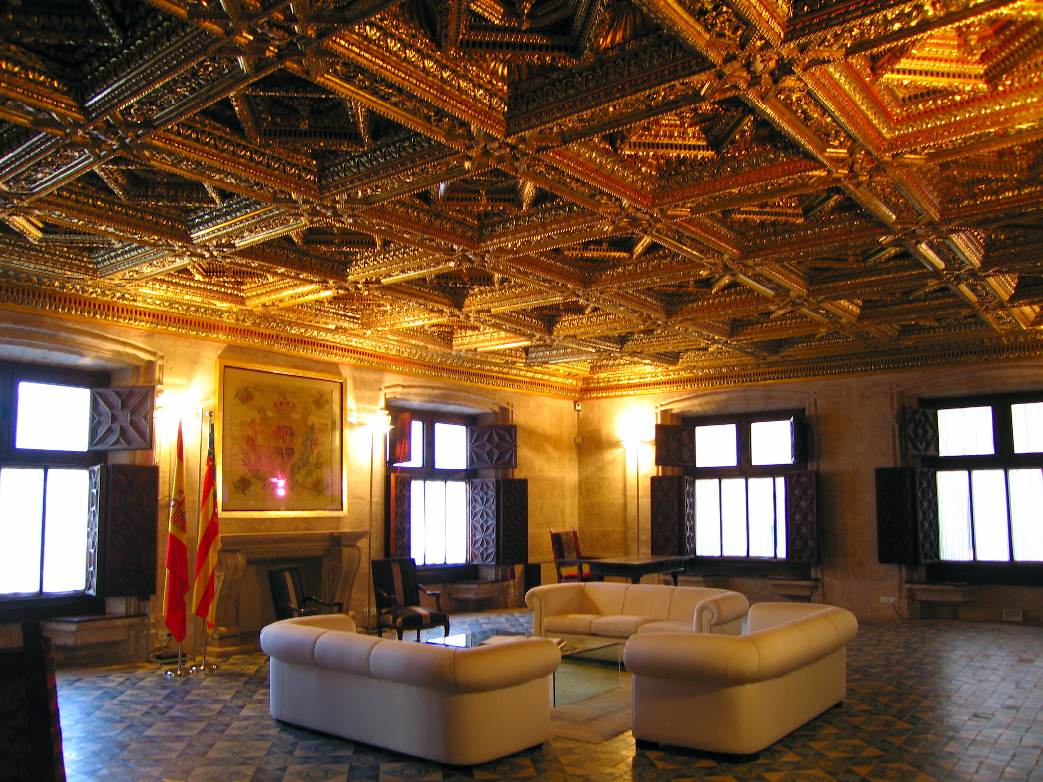 Sala Daurada de la Generalitat Valenciana